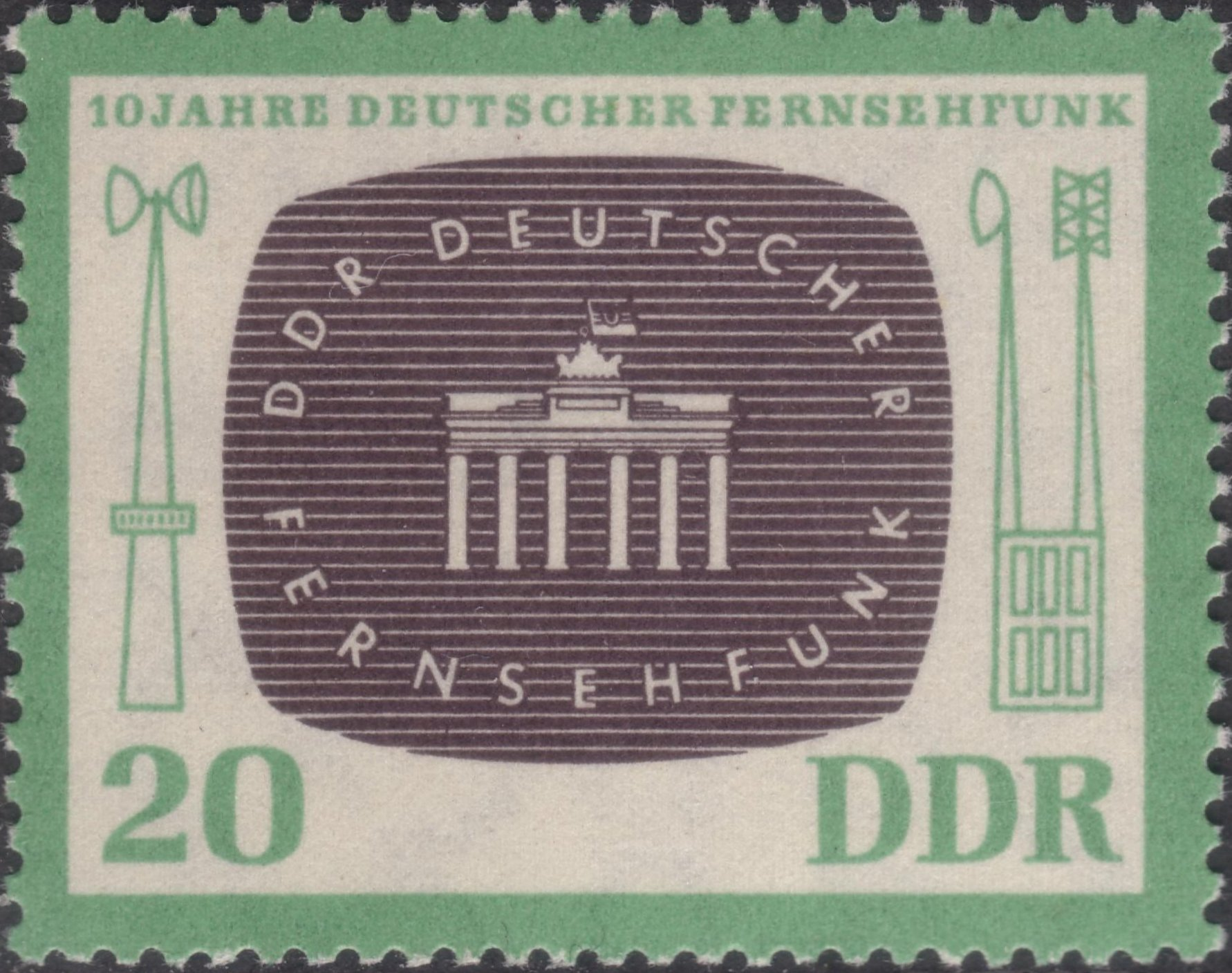 Briefmarke / stamp DDR 1962 Michel 923